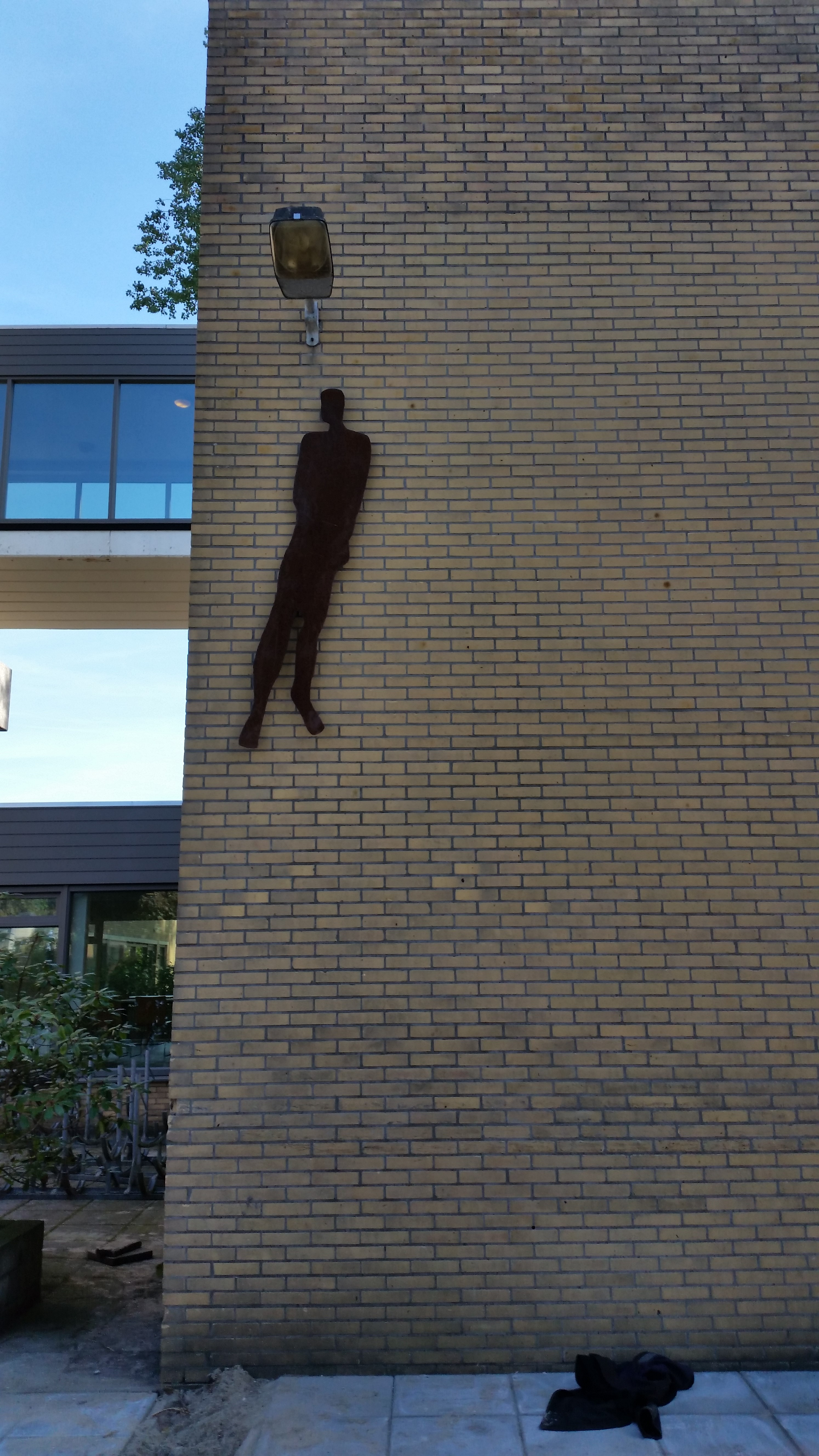 Mens in beweging, een van de vier uitgesneden silhouetten